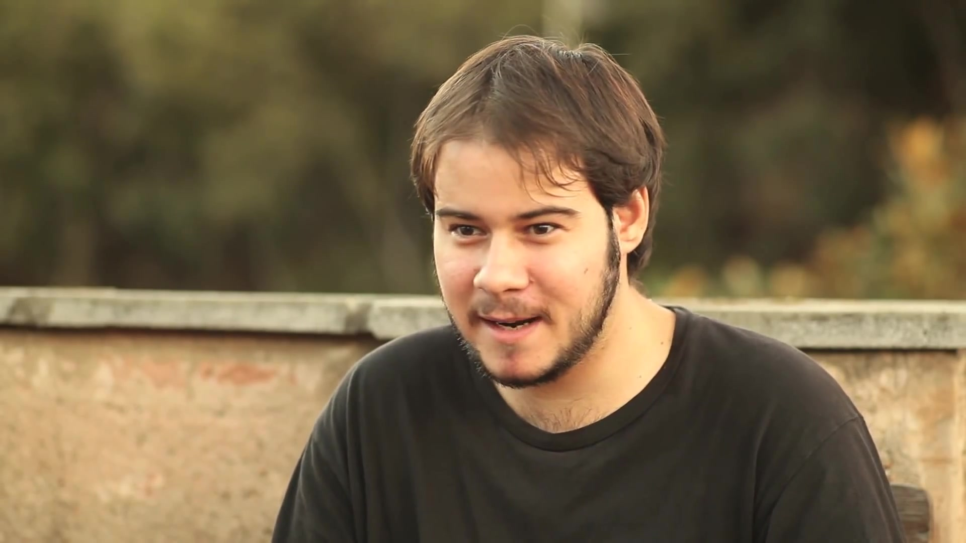 Pablo Hasél tras su detención y posterior puesta en libertad con cargos relata sus impresiones y reflexiona sobre la criminalización de la izquierda real.